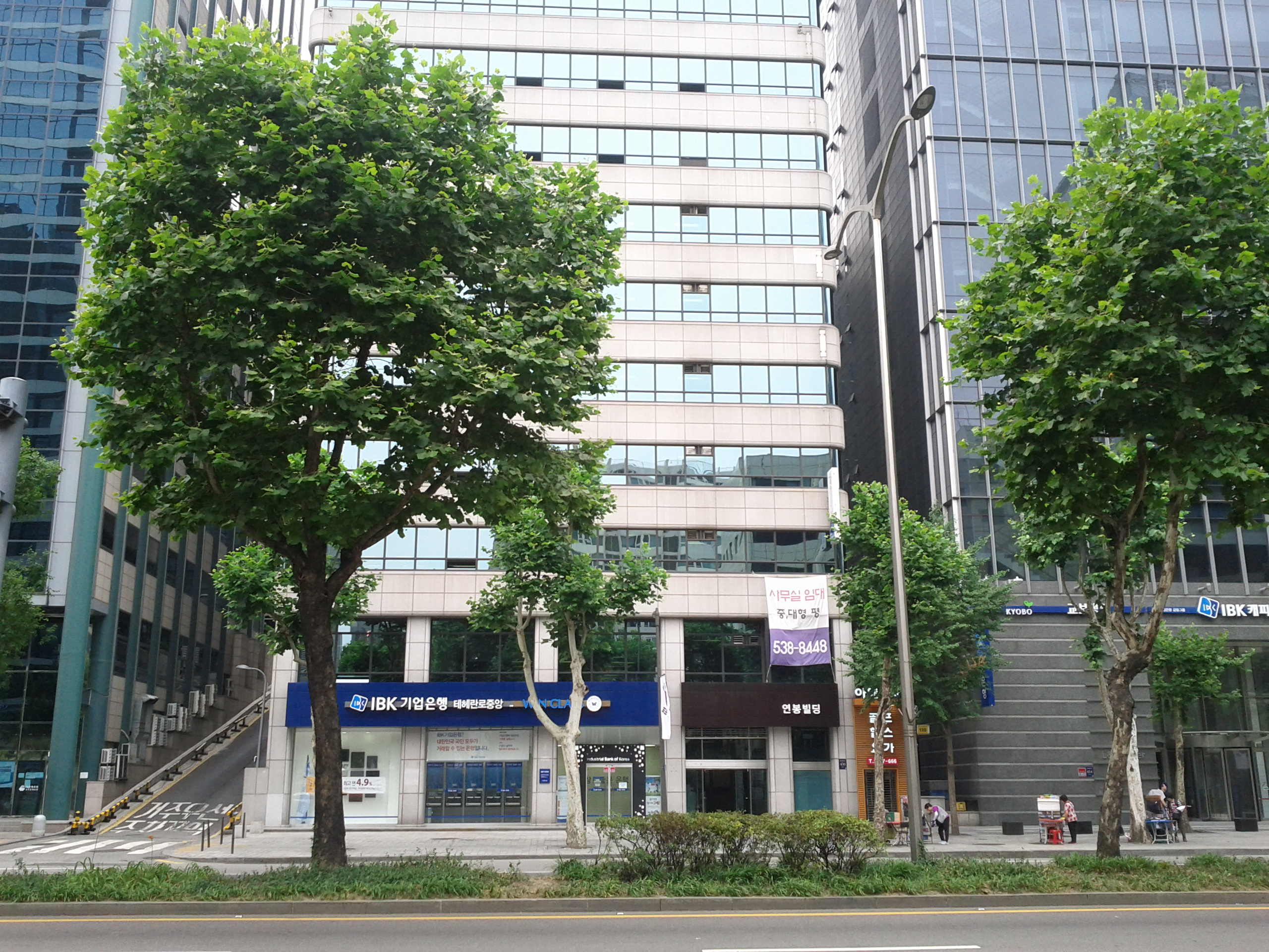 한국마사회 선릉지점